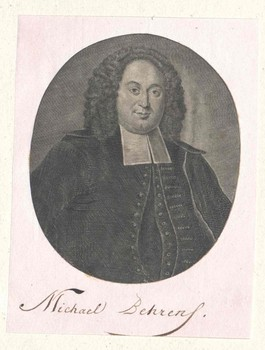 Michael Berns (Behrens), Theologe, Diakon zu Wesselburen, Pfarrer zu Wandsbek